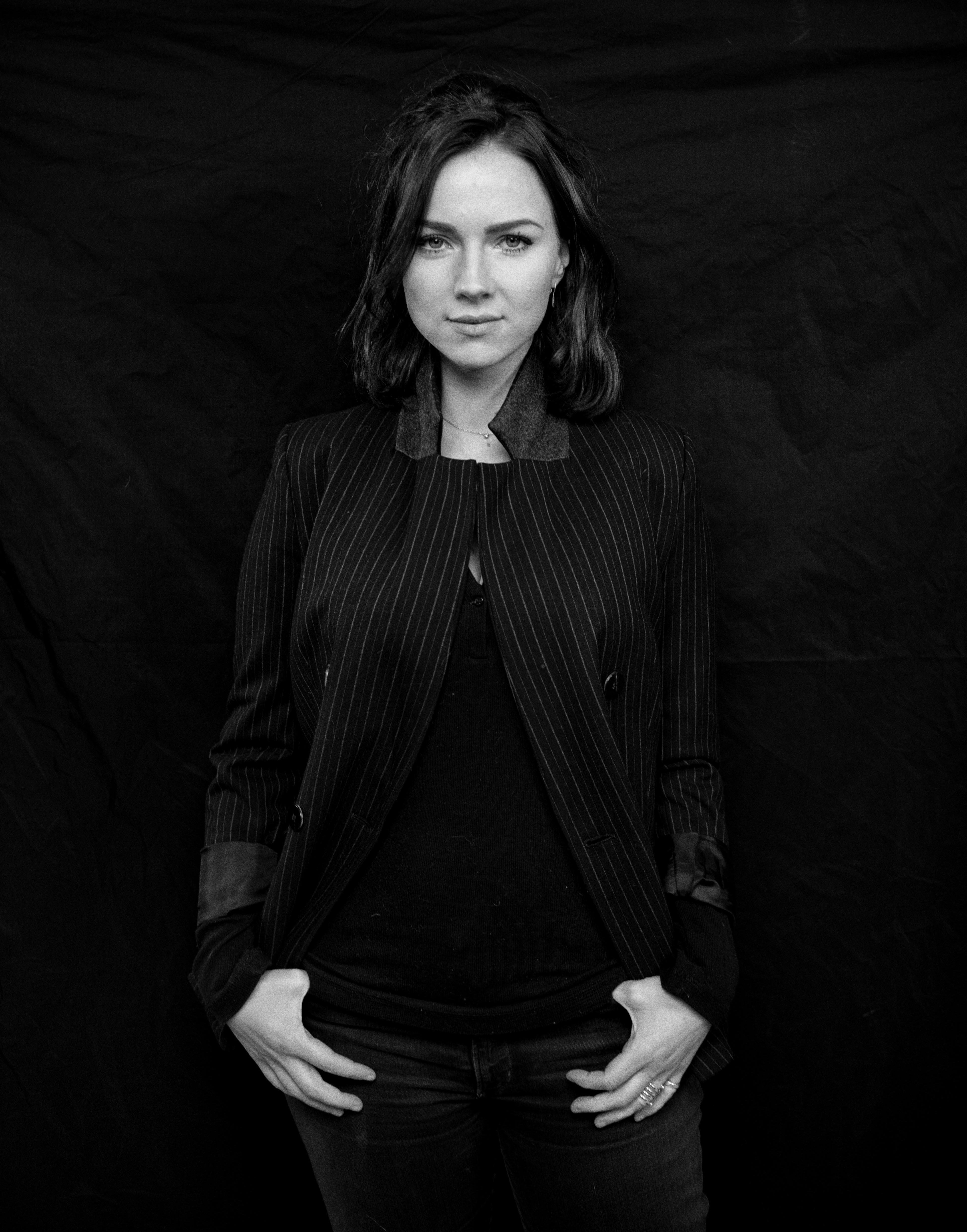 Ancilla van de Leest